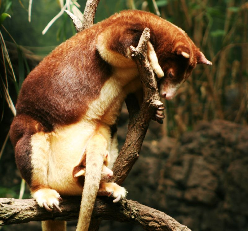 Dendrolagus matschiei Note the large joey. Zoo New York